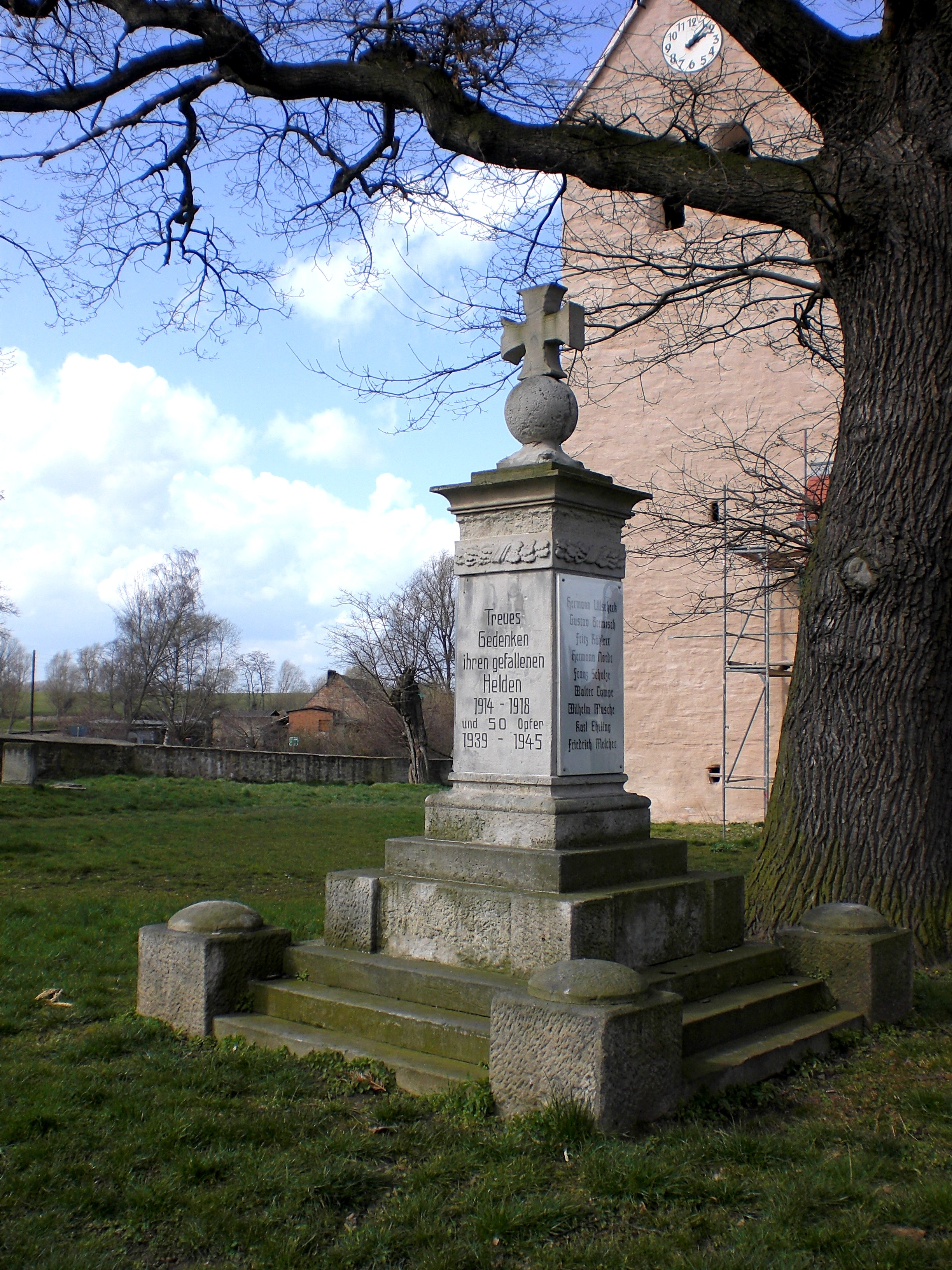 Kriegerdenkmal südlich der Sankt-Christophorus-Kirche in Dodendorf, Sachsen-Anhalt während der Restaurierungsarbeiten 2008